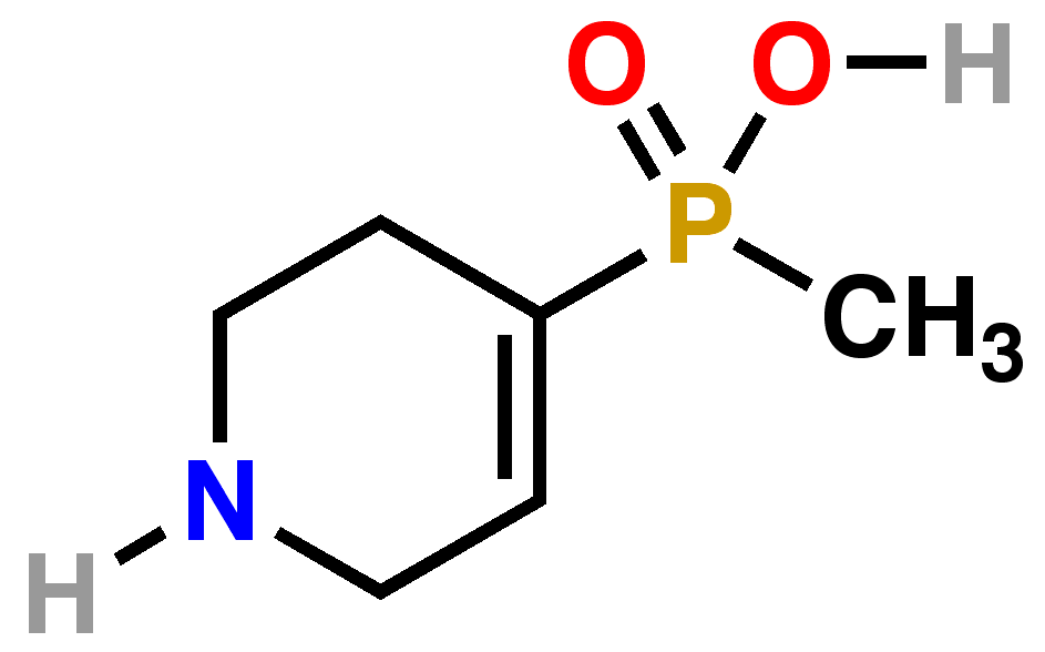 (1,2,5,6-Tetrahydropyridin-4-yl)methylphosphinic acid